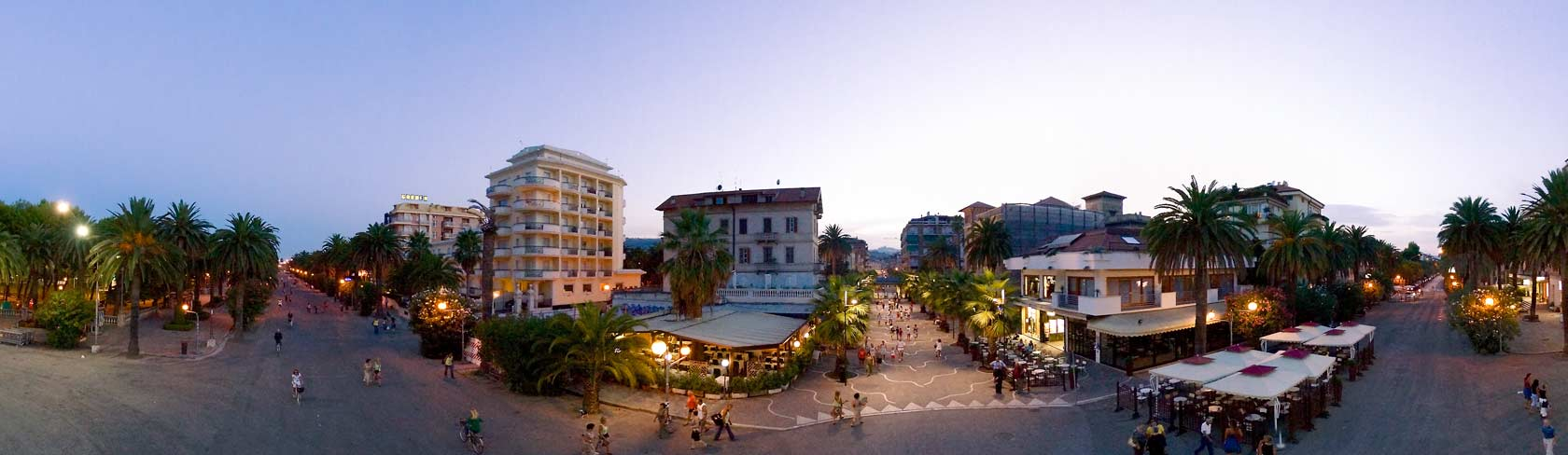 Il Corso il luogo d'incontro della popolazione sambenedettese e dei dintorni